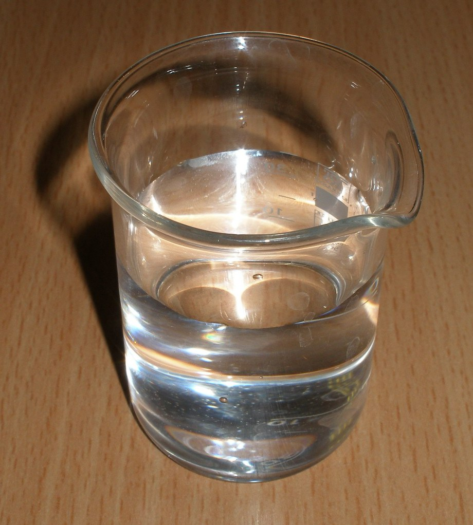 Vārglāze ar ūdeni.